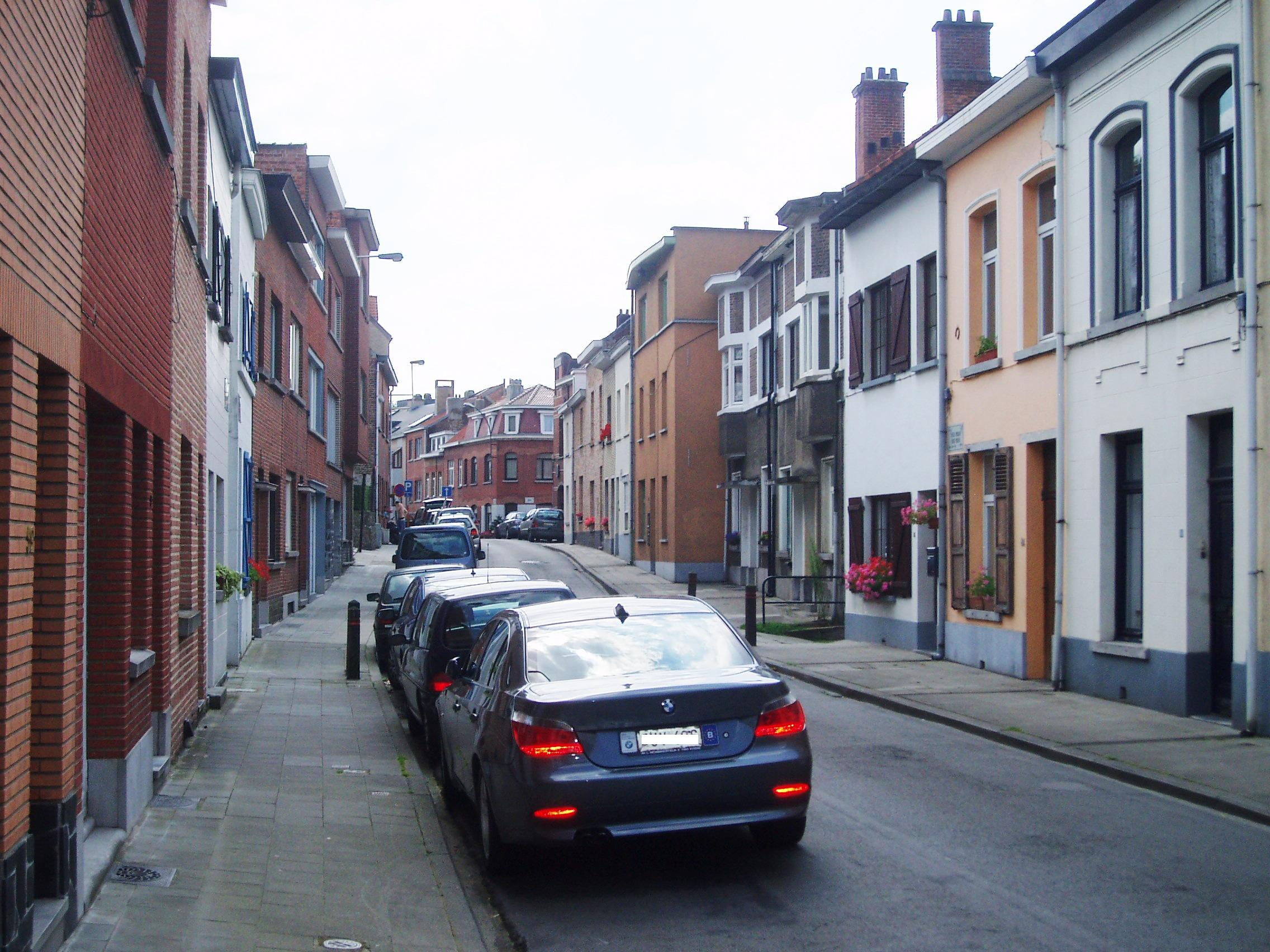 rue du Vieux Moulin Auderghem Belgium